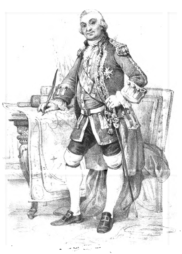 Pierre André de Suffren